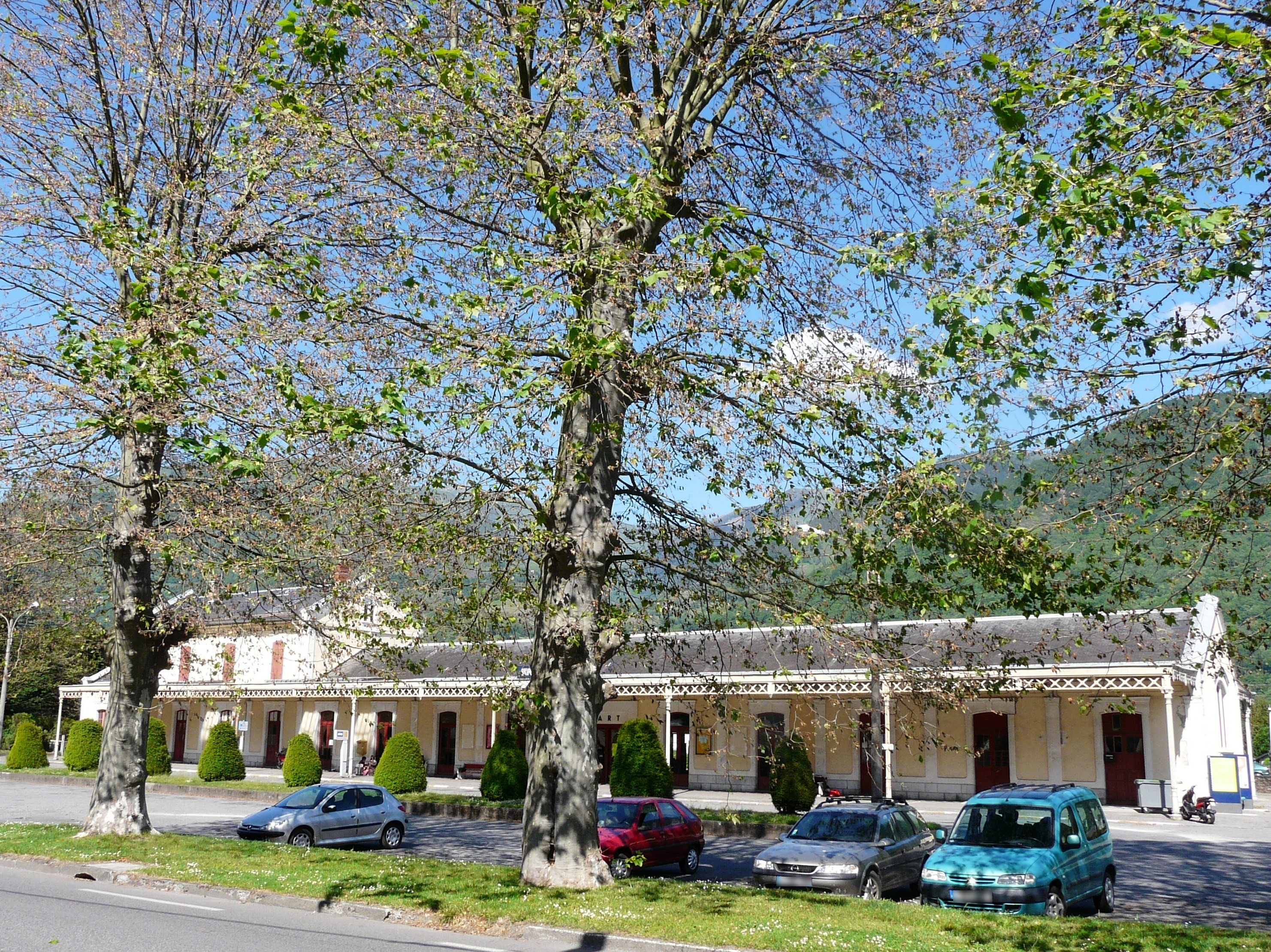 La gare de Luchon, Bagnères-de-Luchon, Haute-Garonne, France.